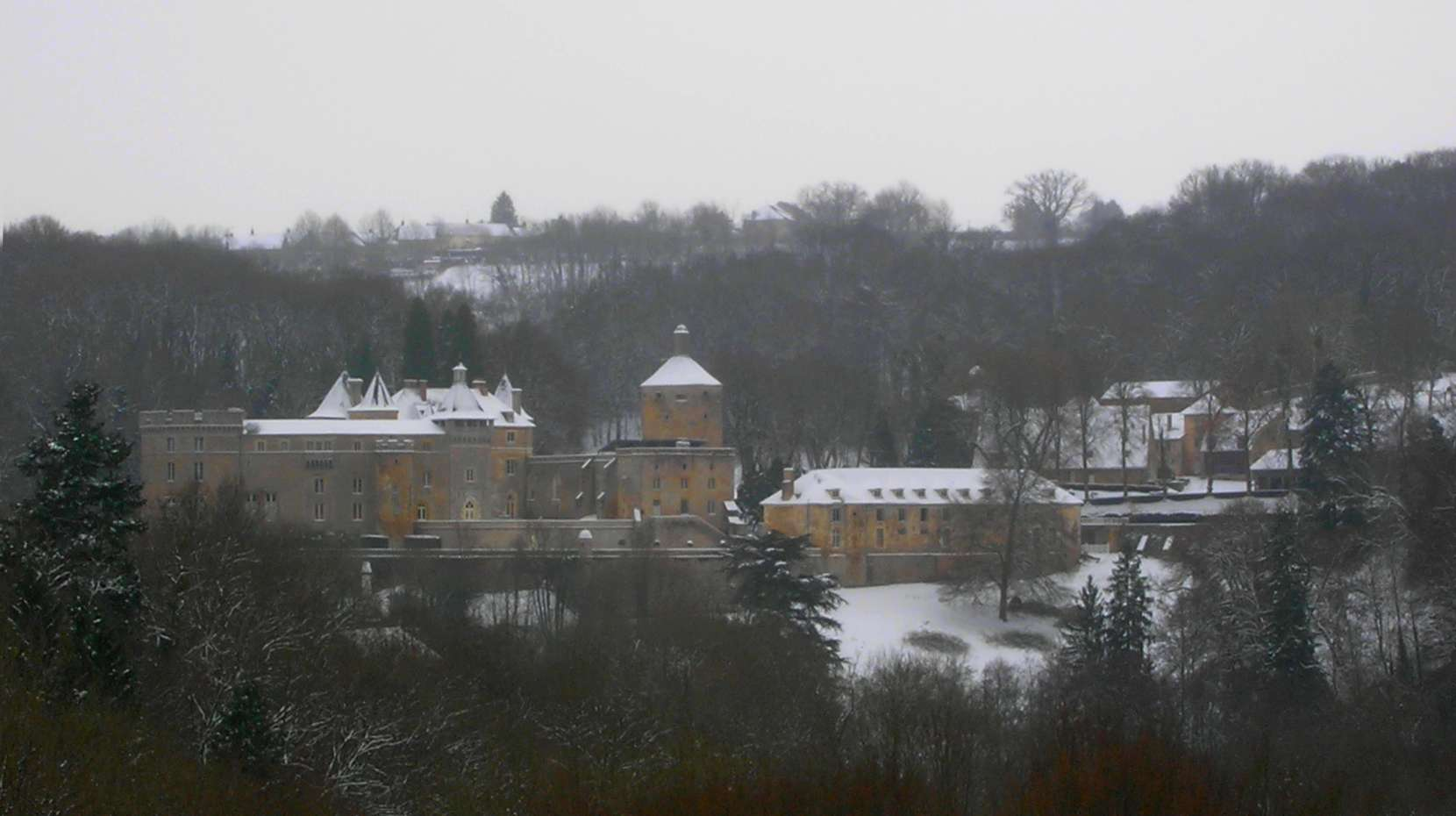 vue ouest du château en hiver